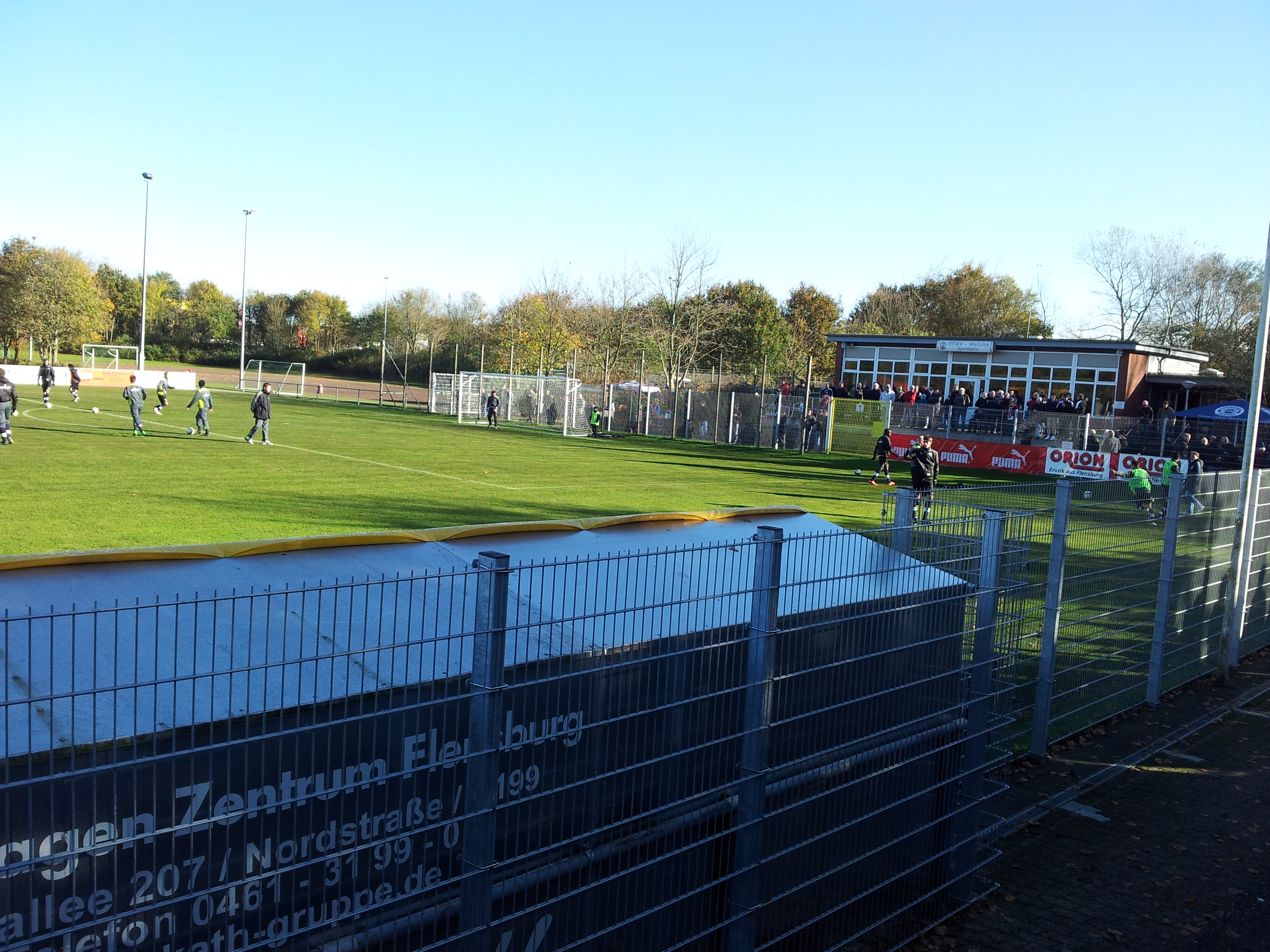 ETSV Weiche, Sportplatz mit Vereinsheim